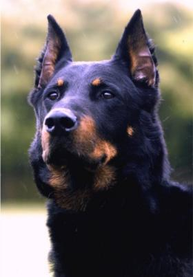 Image Personnelle Agailleton